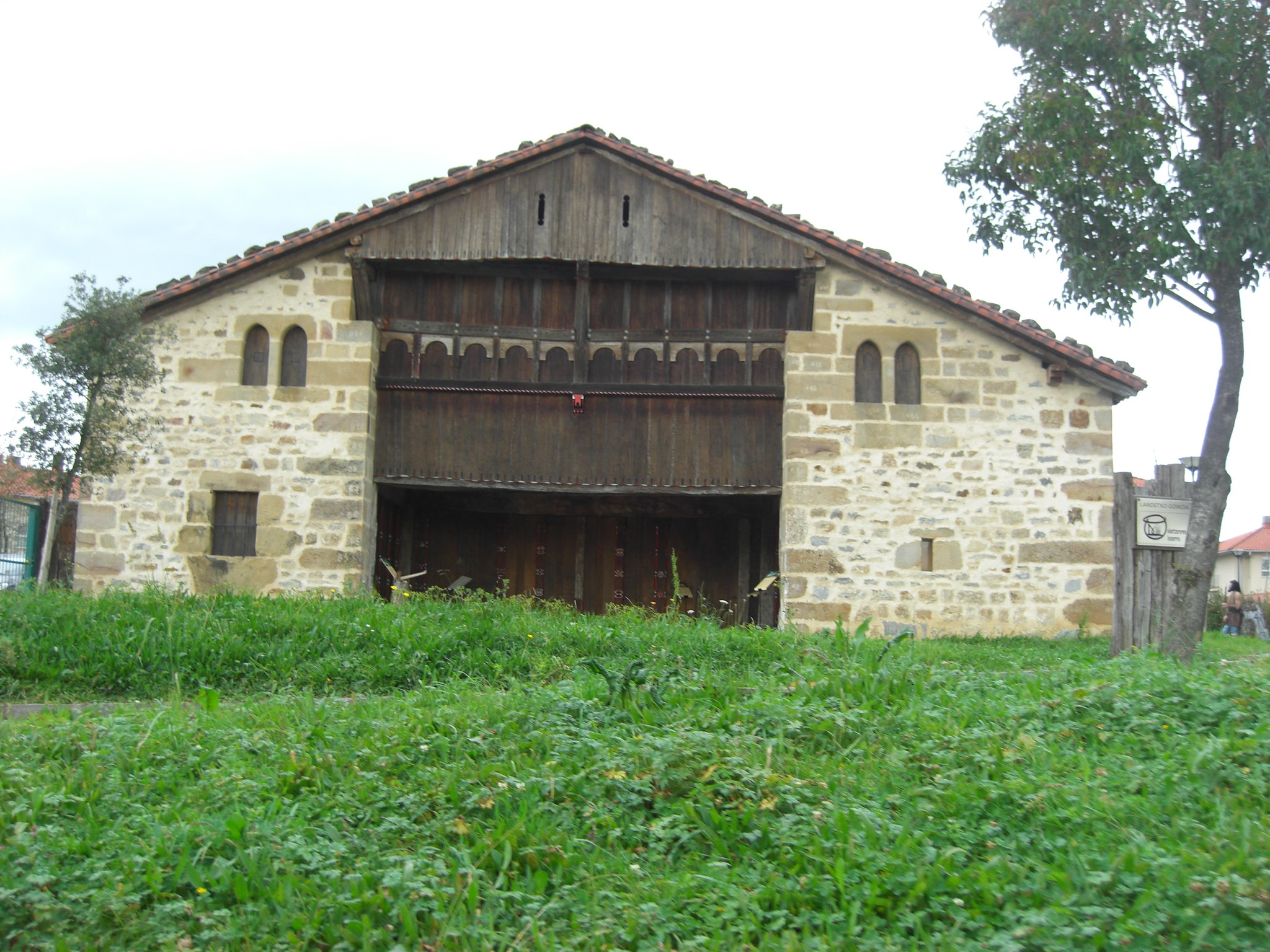 Mungiako Landetxo Goikoa baserria.